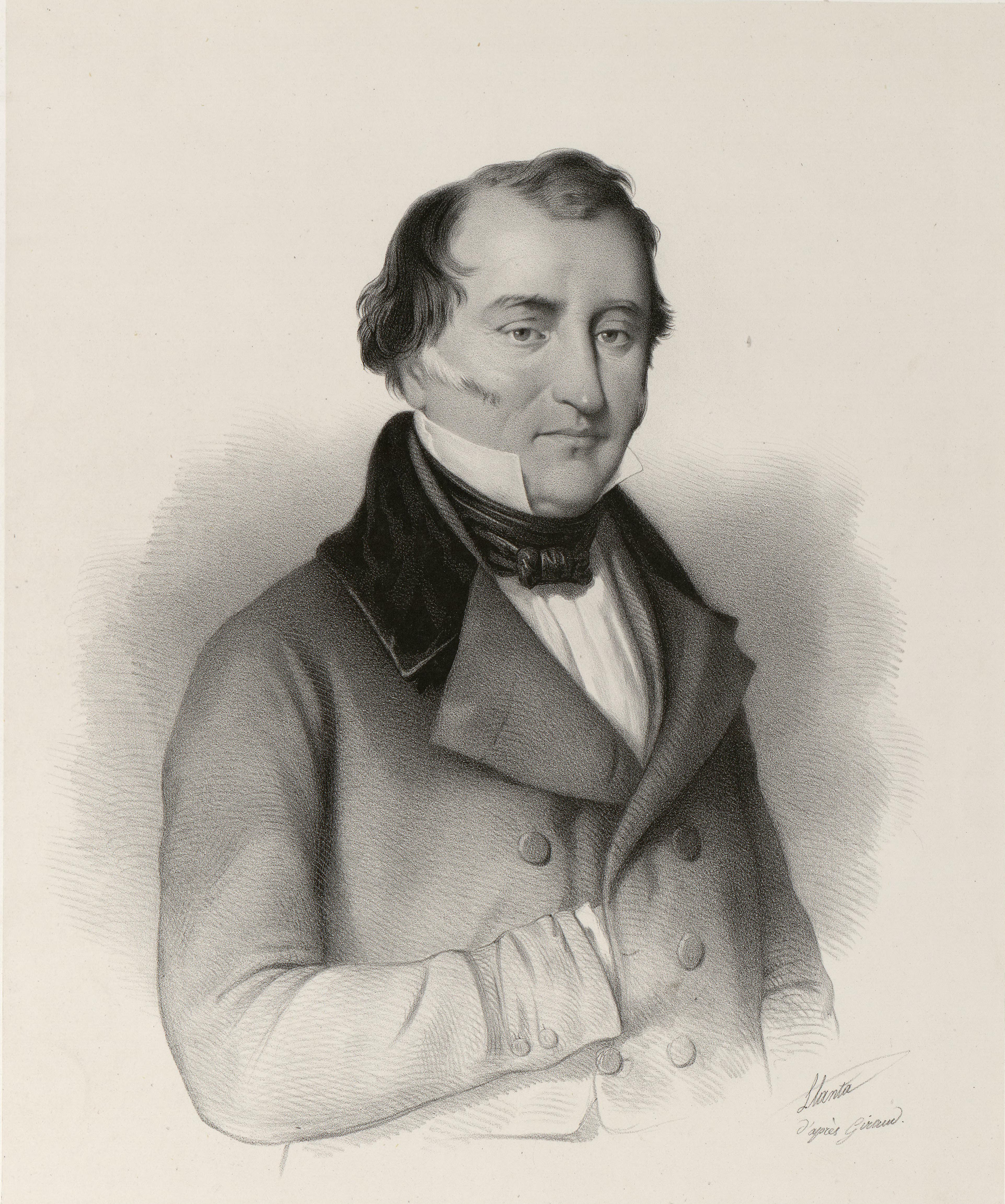 Illustrasjon hentet fra boken "Voyages de la Commission scientifique du Nord, en Scandinavie, en Laponie, au Spitzberg et aux Feröe" av ukjent forfatter og utgitt av Arthus BertrandParis : Arthus Bertrand, [1852] (Paris, [1852])